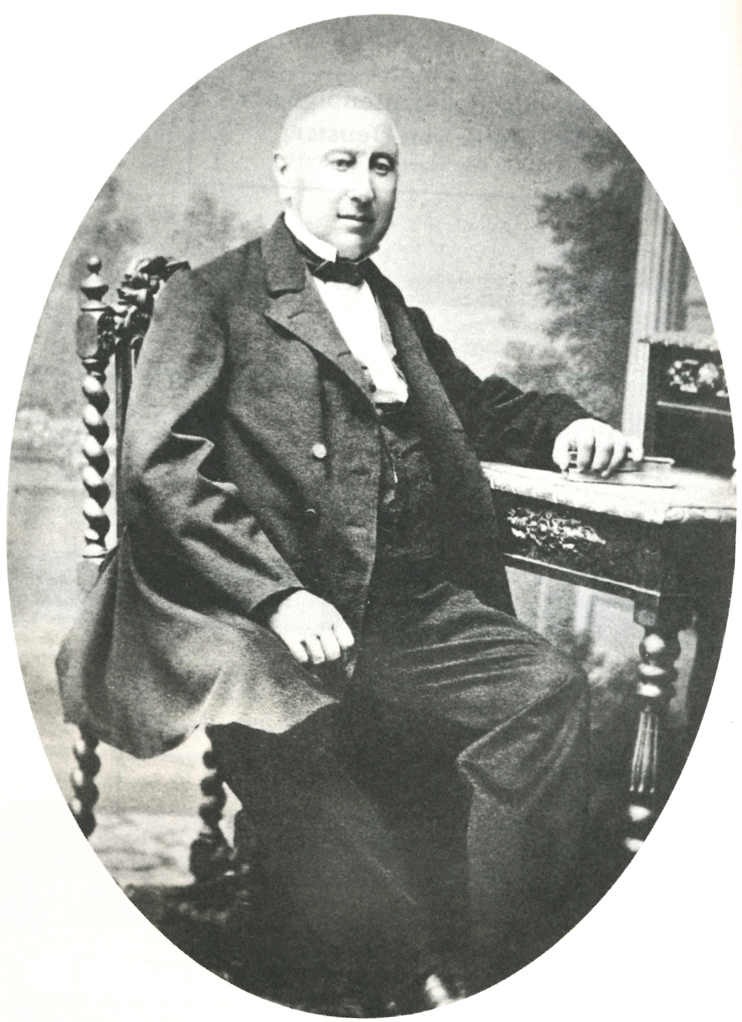 Fotografie vor 1877: Carl Otto II. Deuster (1800-1877), Weinhändler und Politiker